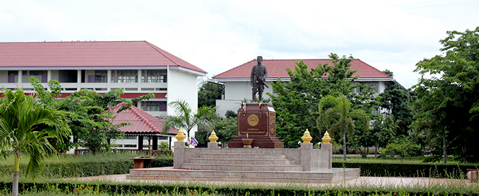 มหาวิทยาลัยราชภัฎบ้านสมเด็จเจ้าพระยา สระยายโสม